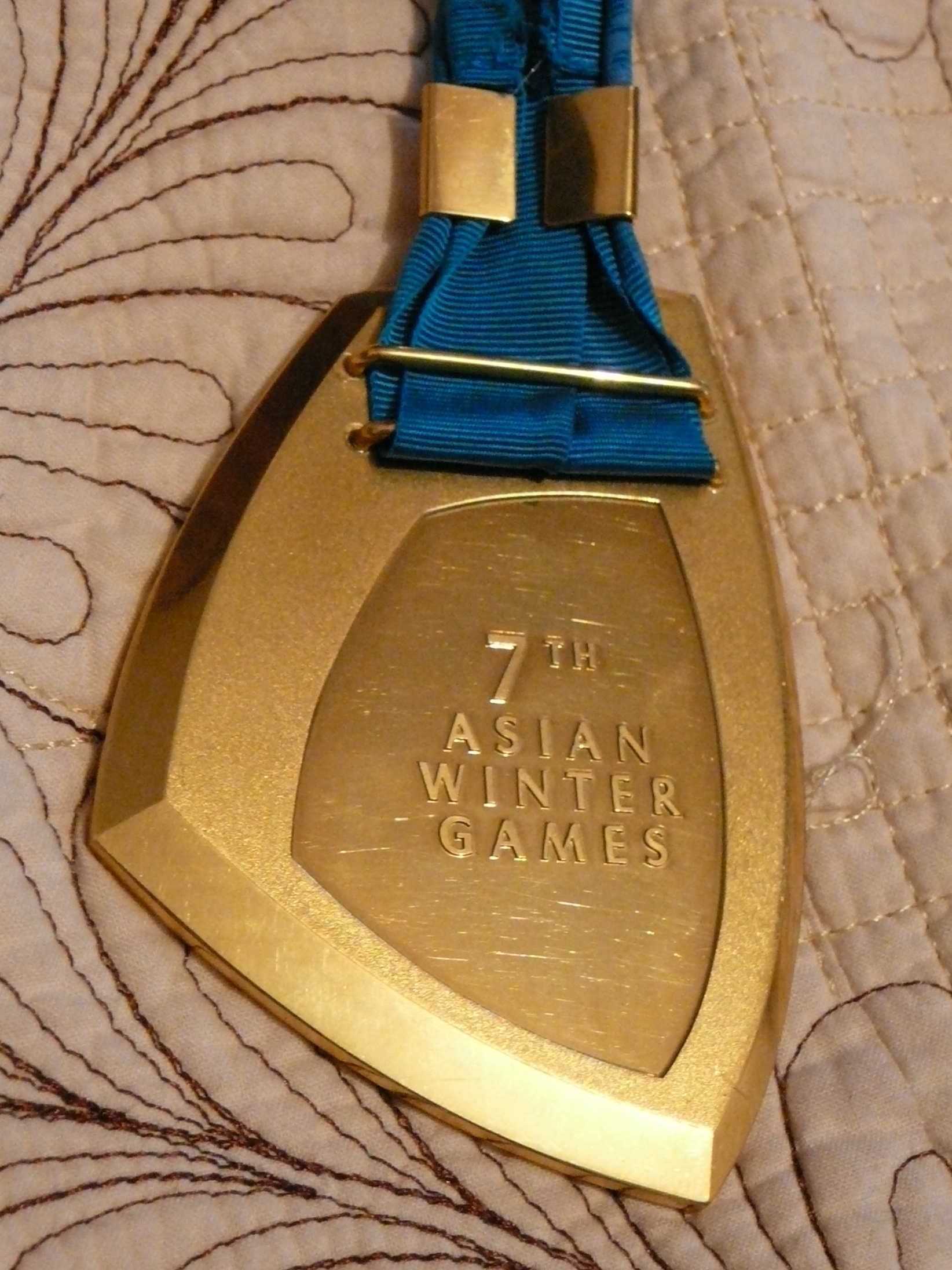 Золотая медаль Азиады-2011. Медаль принадлежит игроку женской сборной Казахстана по хоккею с шайбой - Нургалиевой Галие.